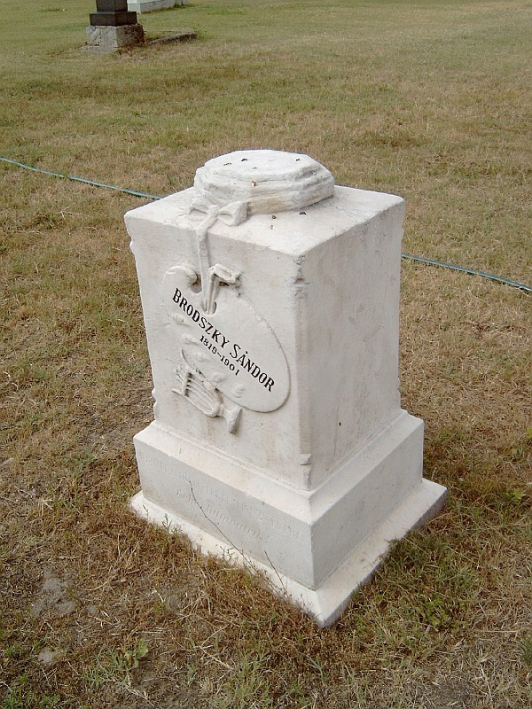 Brodszky Sándor (Tóalmás, 1819. július 20. – Budapest, 1901. január 23.) festő sírja Budapesten. Kerepesi temető: 28-11-12